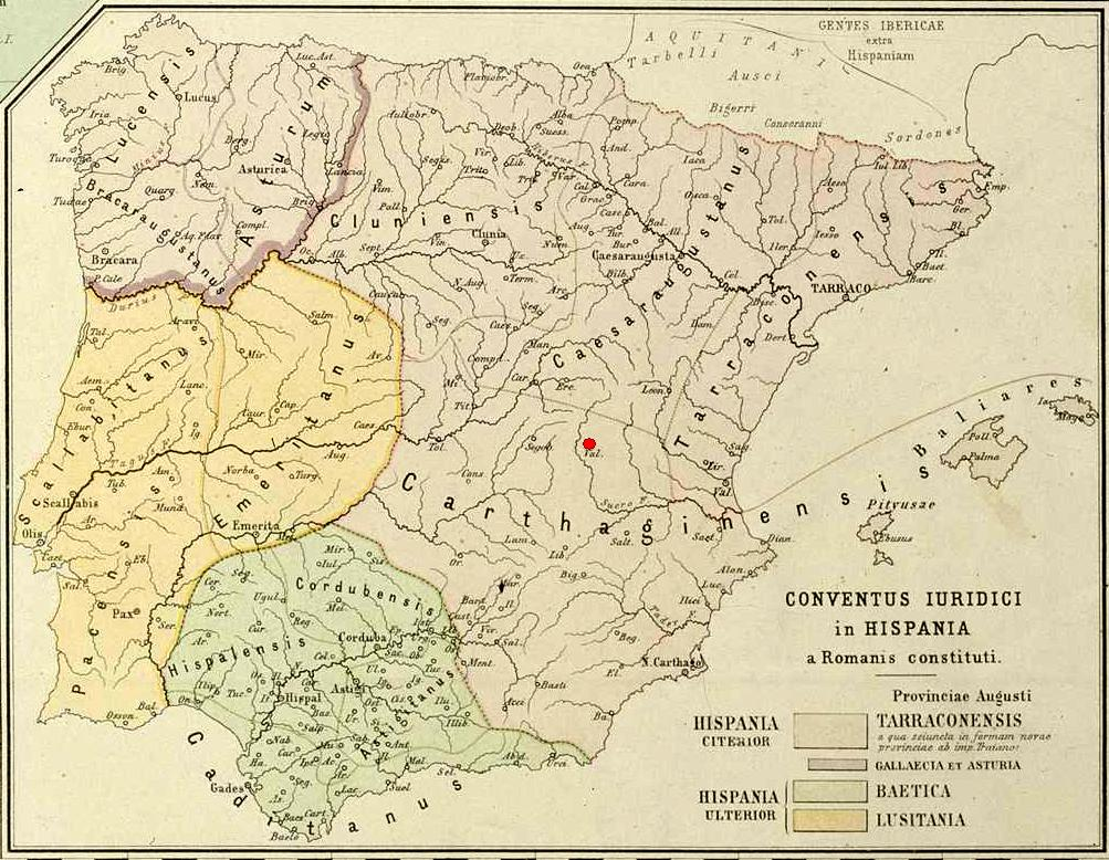 Mapa de los conventi iuridici en Hispania.